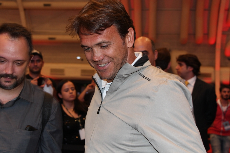 Petkovic